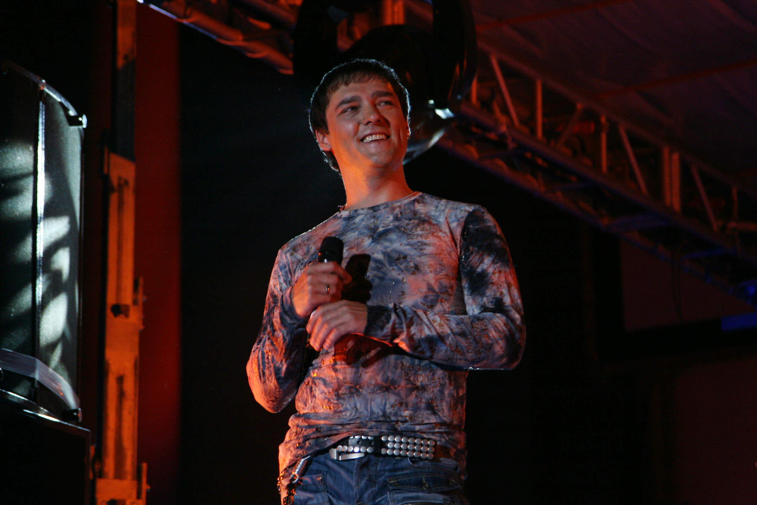 Юрий Шатунов во время представления фильма "Ласковый май" на 20м Кинотавре